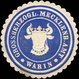 Sealing stamp Title: Grossherzoglich Mecklenburgische Amt - Warin Description: blau, weiß, geprägt Place: Warin size: 4 cm